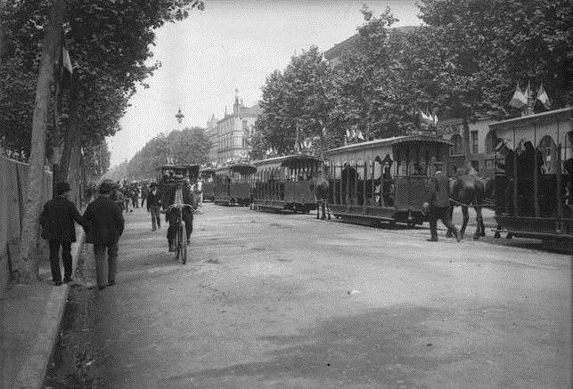 Boulevard Lazare-Carnot. 16 mai 1895. Vue perspective du boulevard encombré de passants et de tramways à l'occasion du Concours Régional Agricole. Au second plan le carrefour avec l'allée Jean-Jaurès et le boulevard de Strasbourg.